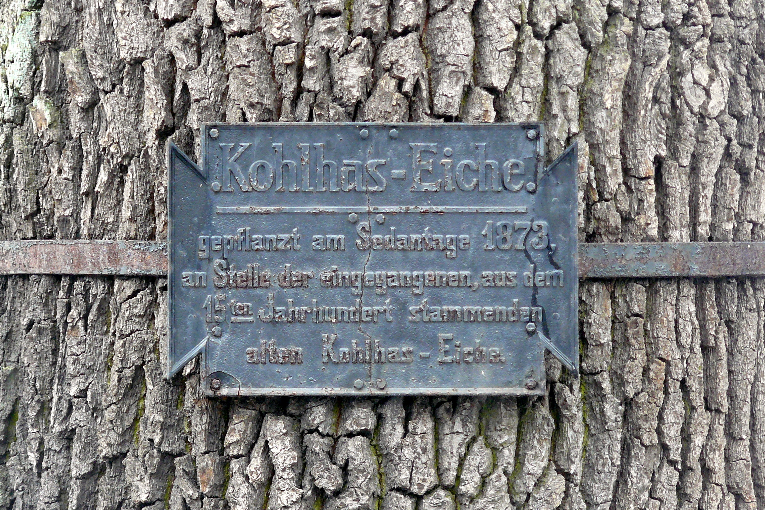 Gedenktafel an der Kohlhas-Eiche in Kohlhasenbrück, Berlin-Wannsee